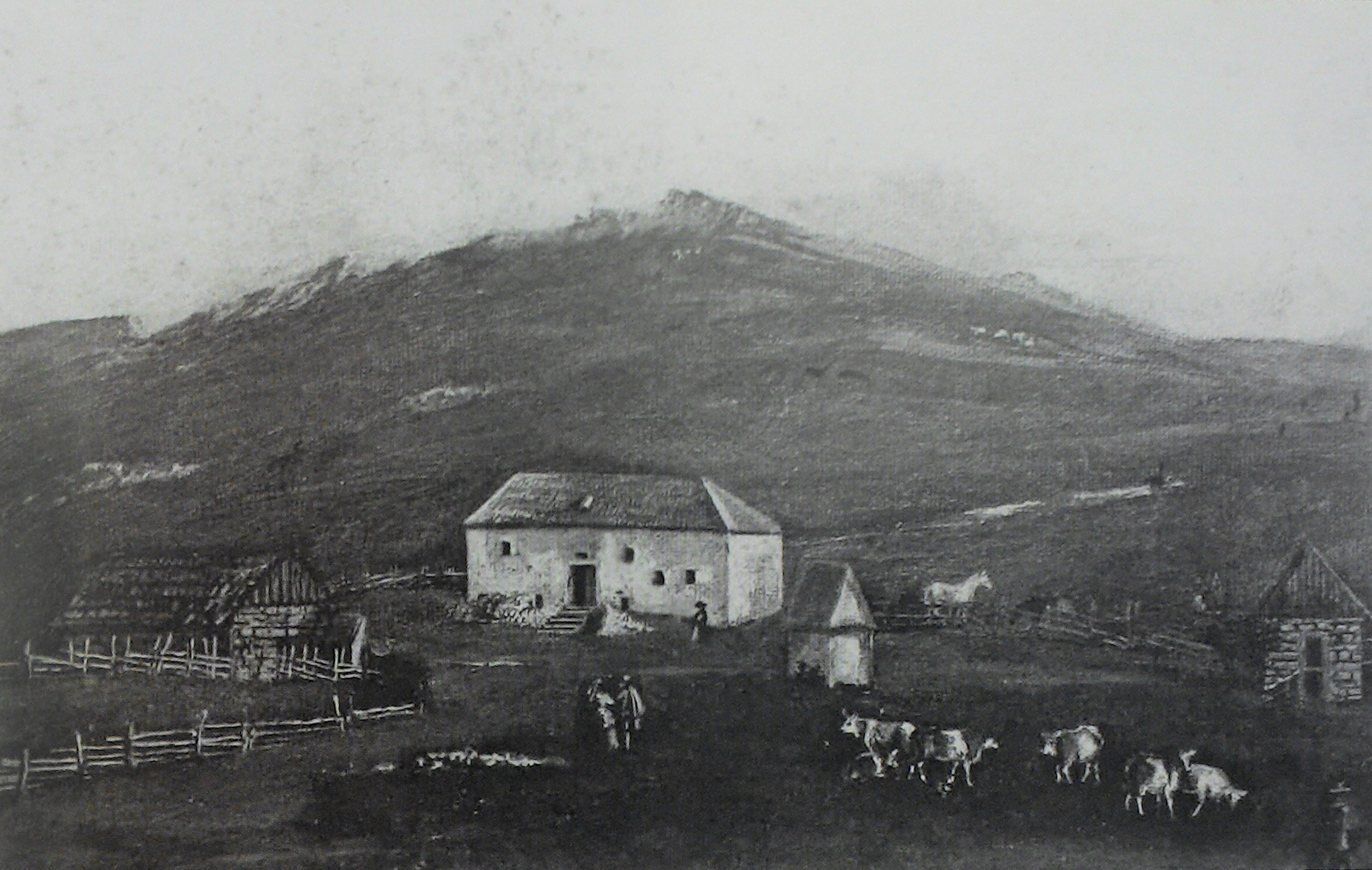 Historische Darstellung des Alten Almhauses auf der Stubalpe